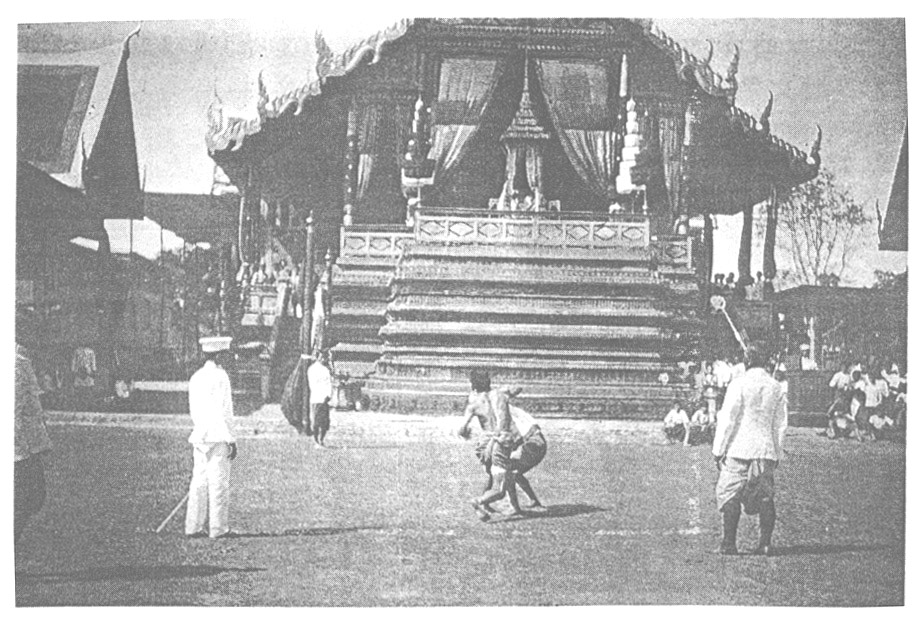 หมื่นมวยมีชื่อ ถวายการชกหน้าพระที่นั่ง สมัย รัชการที่5 ในพระราชพิธีรัชมังคลาภิเษกในสมัยรัชกาลที่ 5 ณ ฐานเดิมพระที่นั่งสรรเพชญมหาปราสาท